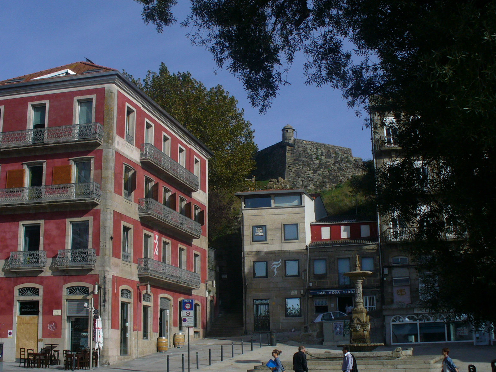 Kastelo de Sankta Sebastiano, en Vigo. Dekstre, la Olivarbo, simbolo de la urbo.